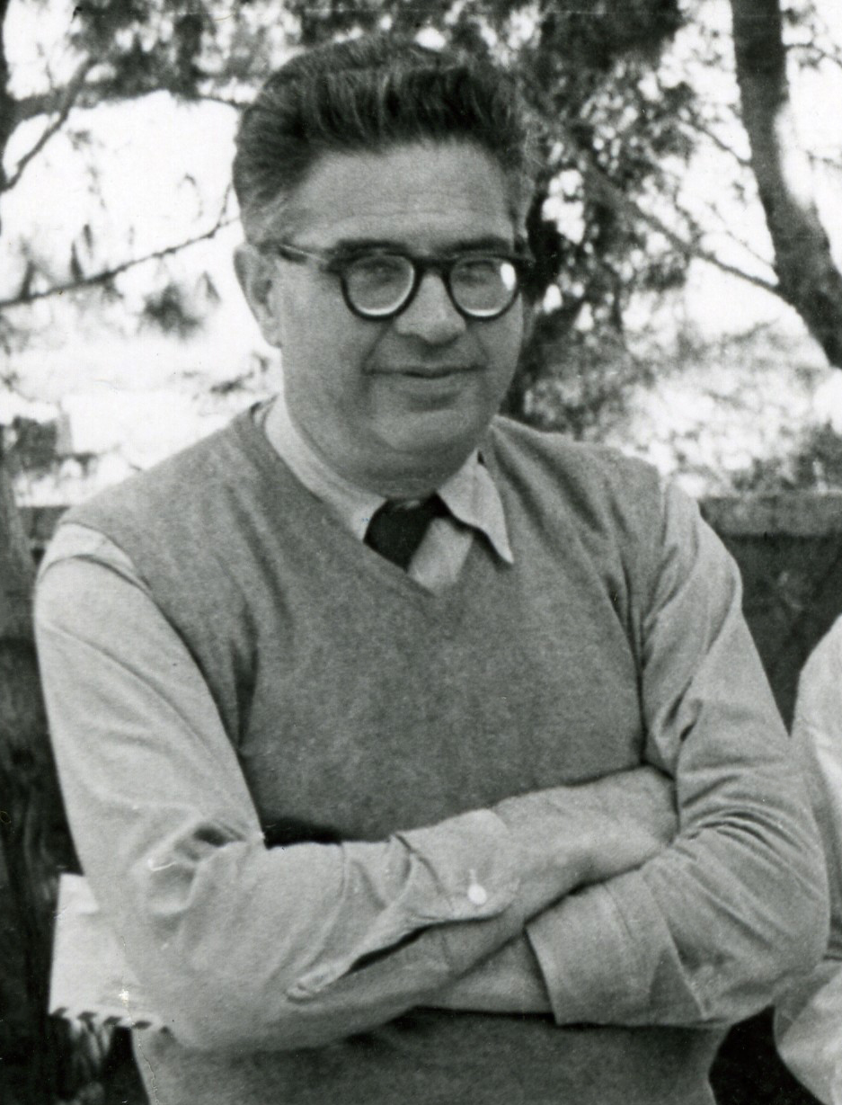 צולם ב-1955. פרופסור גאורג האס, א